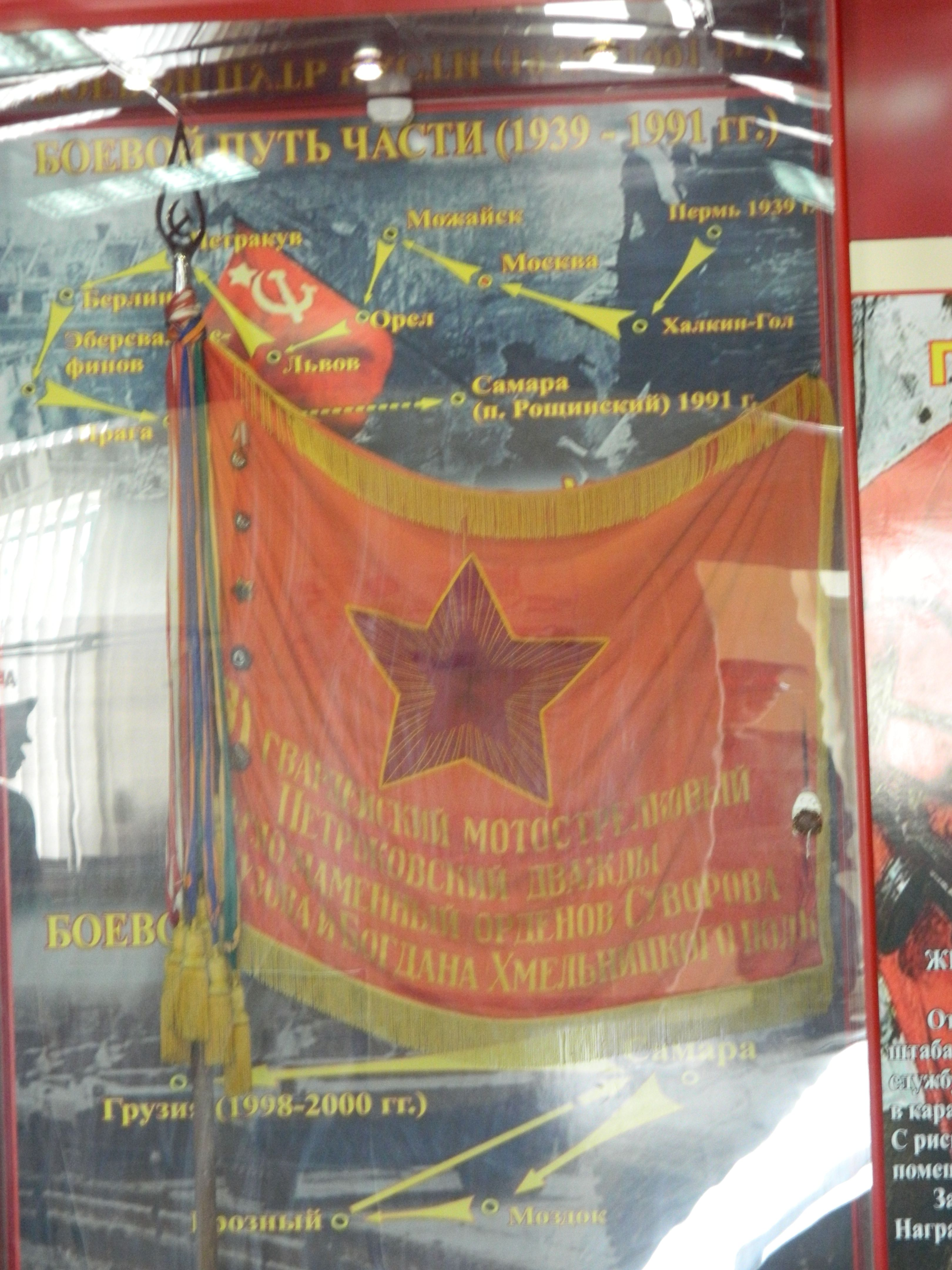 Боевое знамя 81 гвардейского мотострелкового полка. Находится в штабе 23 ОМСБр.